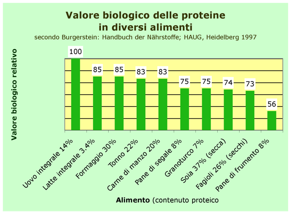 Valore biologico di proteine in alimenti per l'essere umano diagramma, valore biologico, proteine alimentari, umano, uovo, latte, formaggio, pesce, carne, leguminacee, graminacee